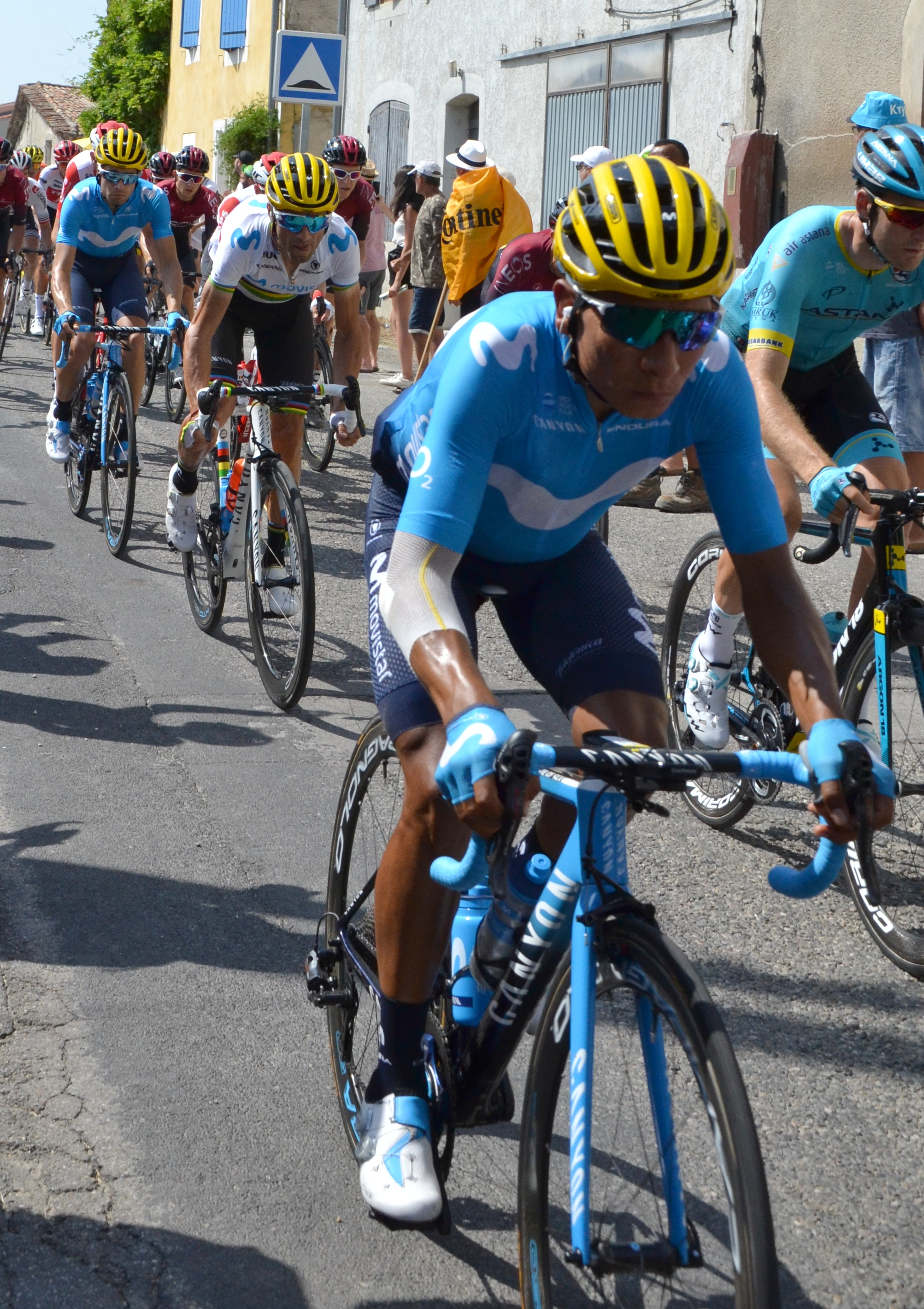 Tour de France 2019, étape 16, passage de 3 coureurs Movistar à Lédignan.